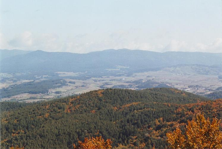 Foto di Bruno Francesco Pileggi